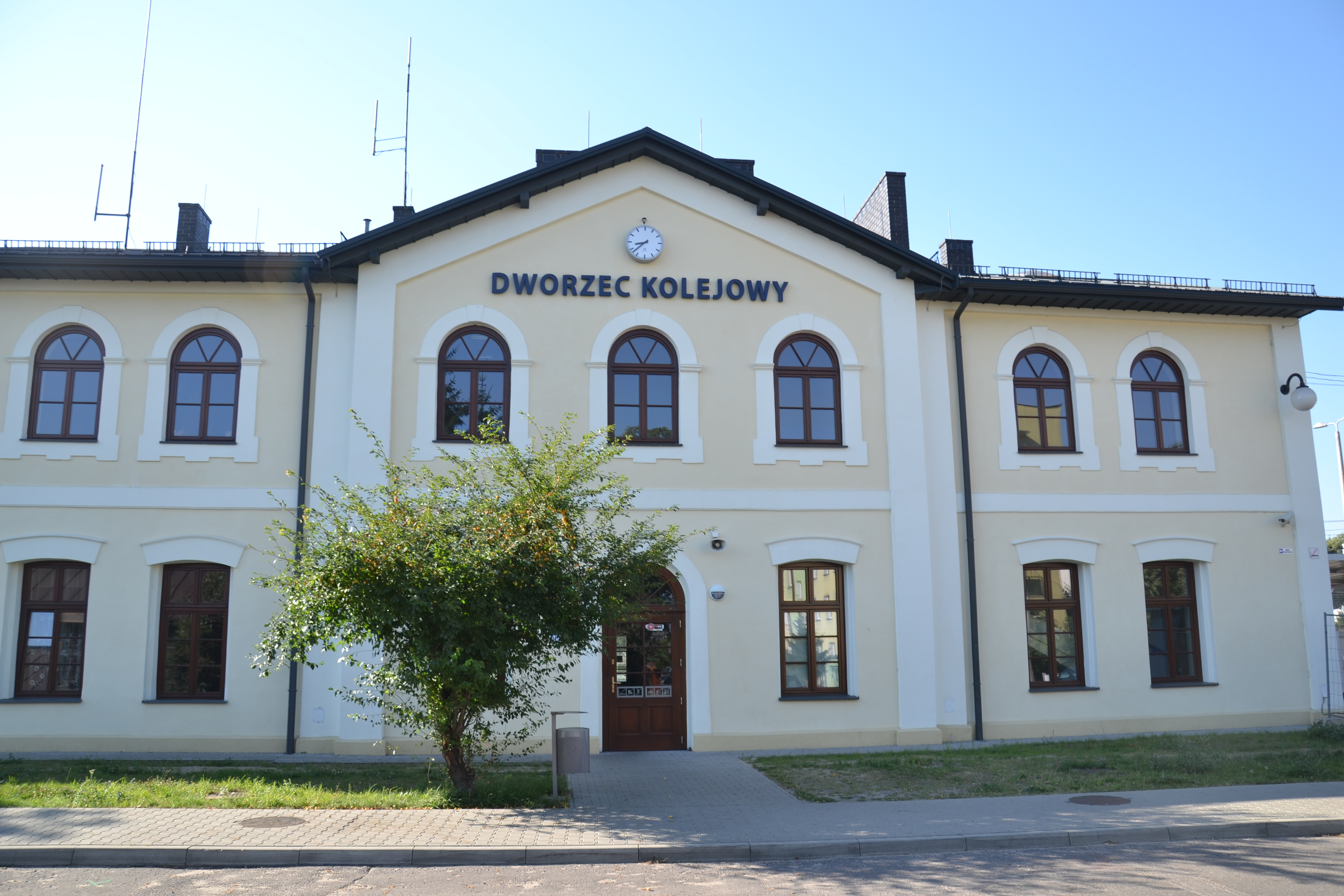 Widok stacji Międrzyrzec Podlaski od strony miasta This photo was taken during Railway Wikiexpedition 2015 set up by Wikimedia Polska Association in cooperation with Fundacja Grupy PKP. You can see all photographs in category Wikiekspedycja kolejowa 2015.